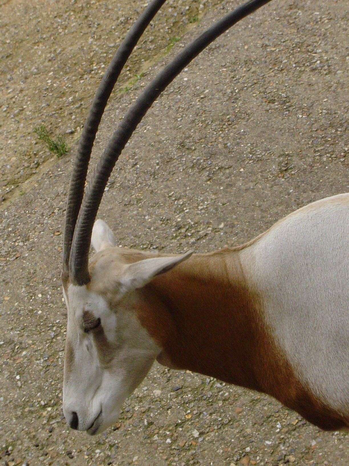 Zoo de Vincennes: Oryx algazelle